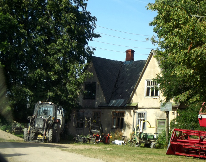 Šarlotes muiža